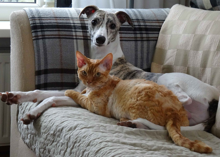 Zztop at home